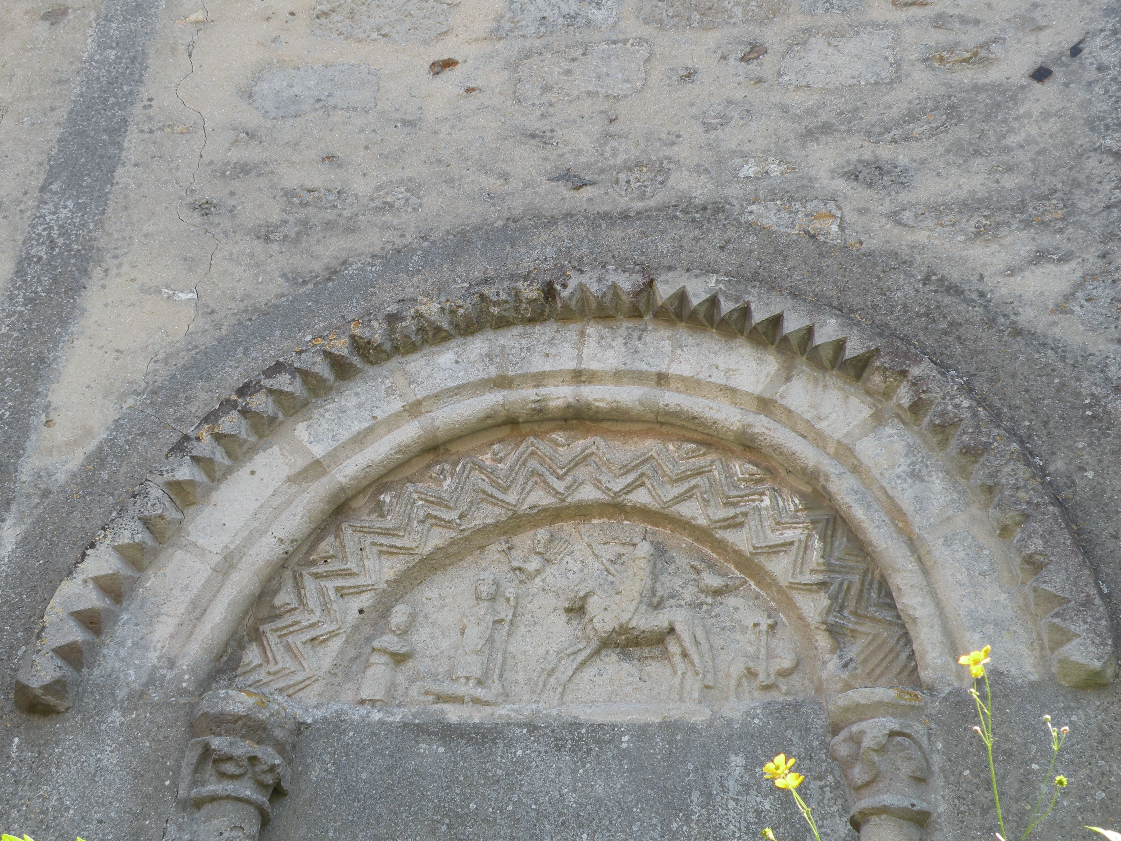 tympan de l'église saint georges de Le Heaulme